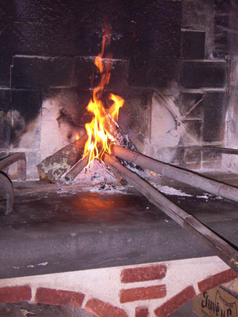 Bambú combustible